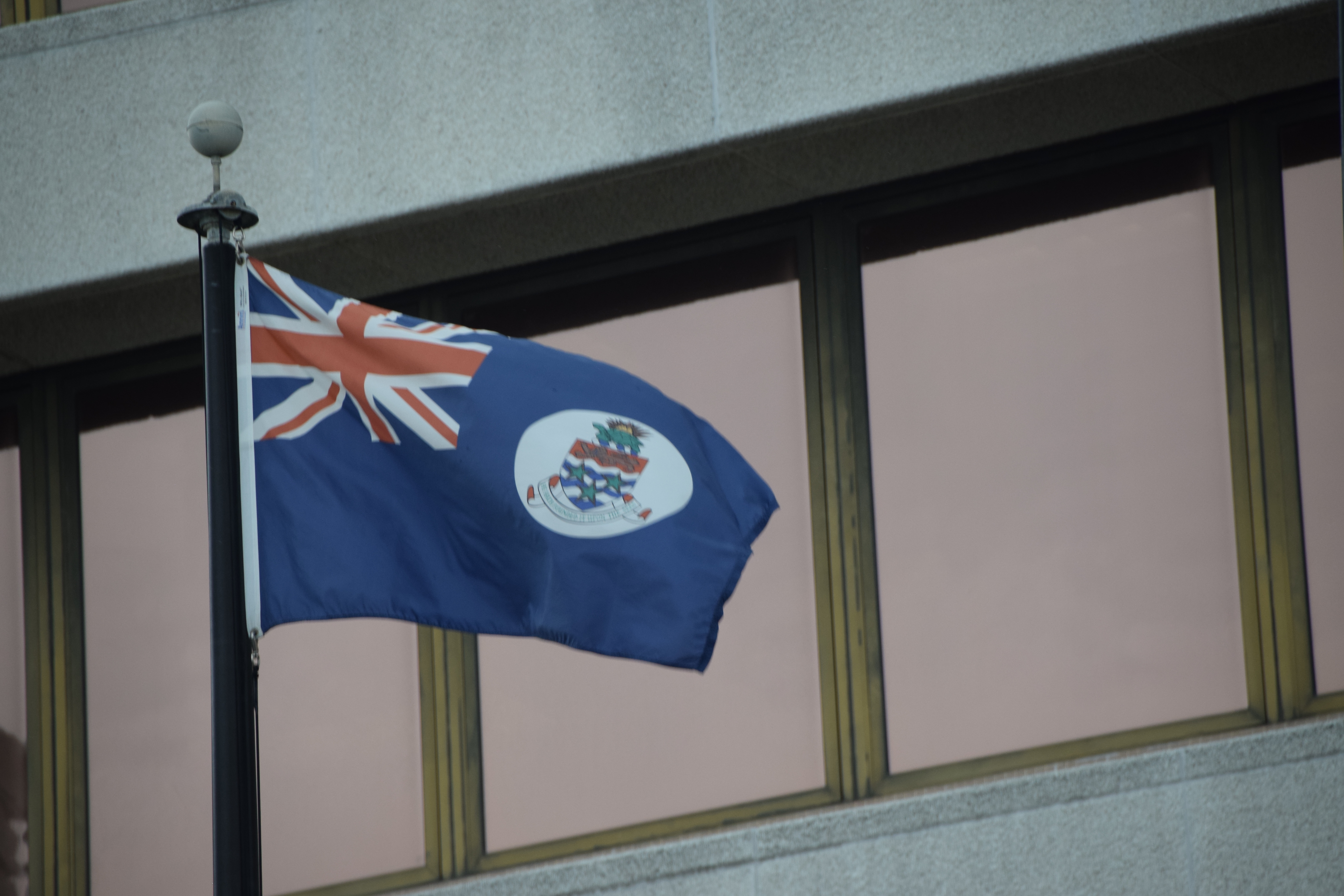 vlag van de Kaaimaneilanden